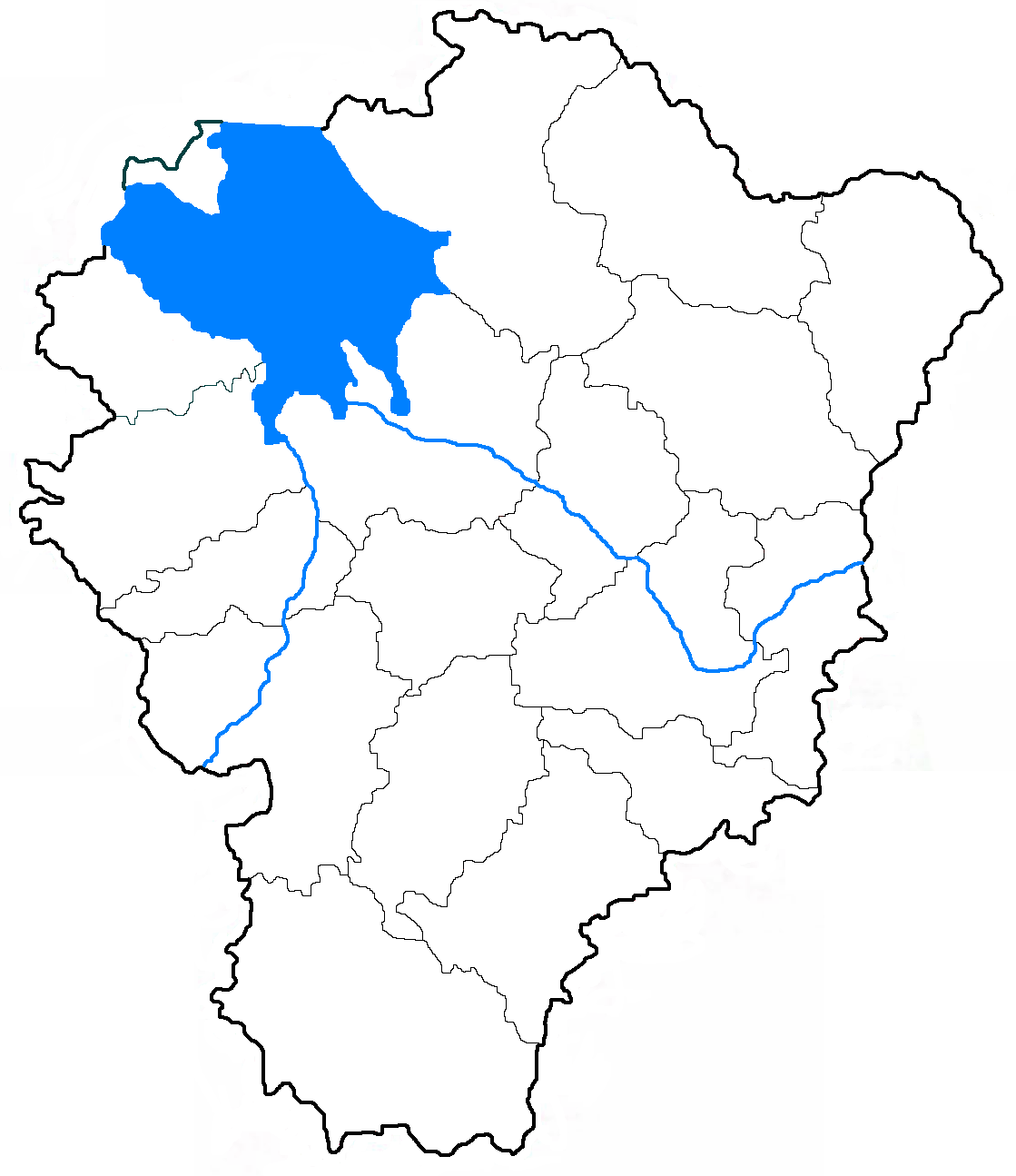 Ярославская область